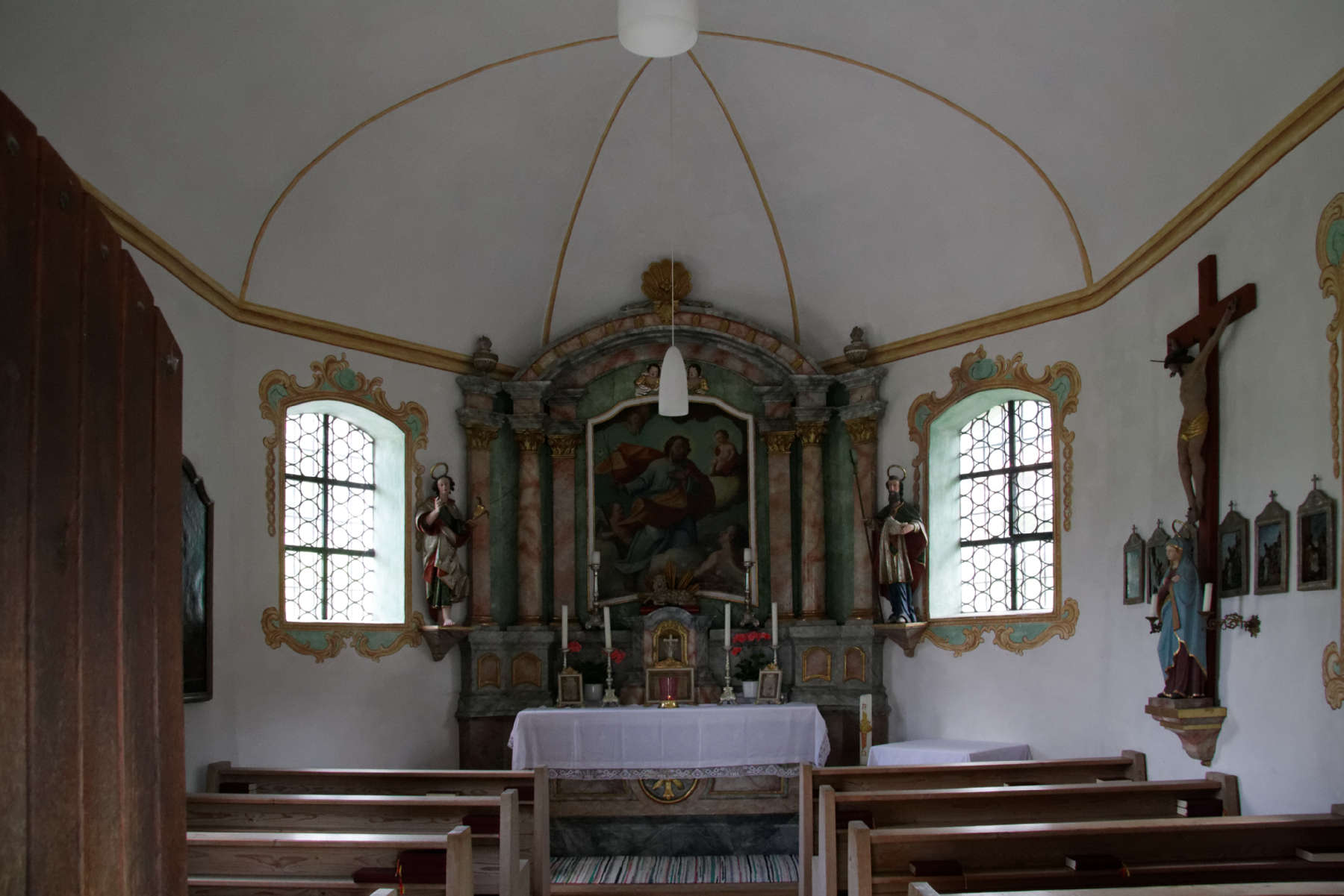 Saulgrub, Kapelle St. Josef im Ortsteil Wurmansau